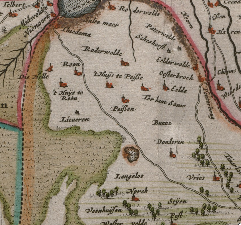 Detail van een oude kaart van Drenthe uit 1634